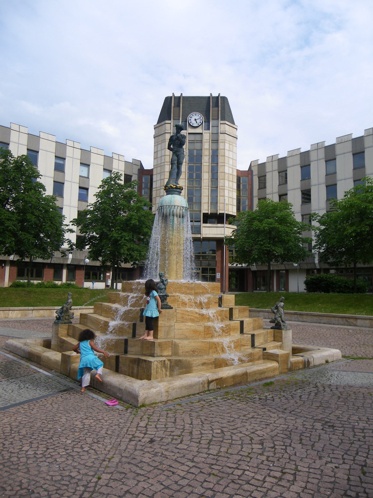 Bernd Göbel (*1942), Hodscha Nasreddin, 1980/2001, Bronze, teilvergoldet Neustädter Passage 15